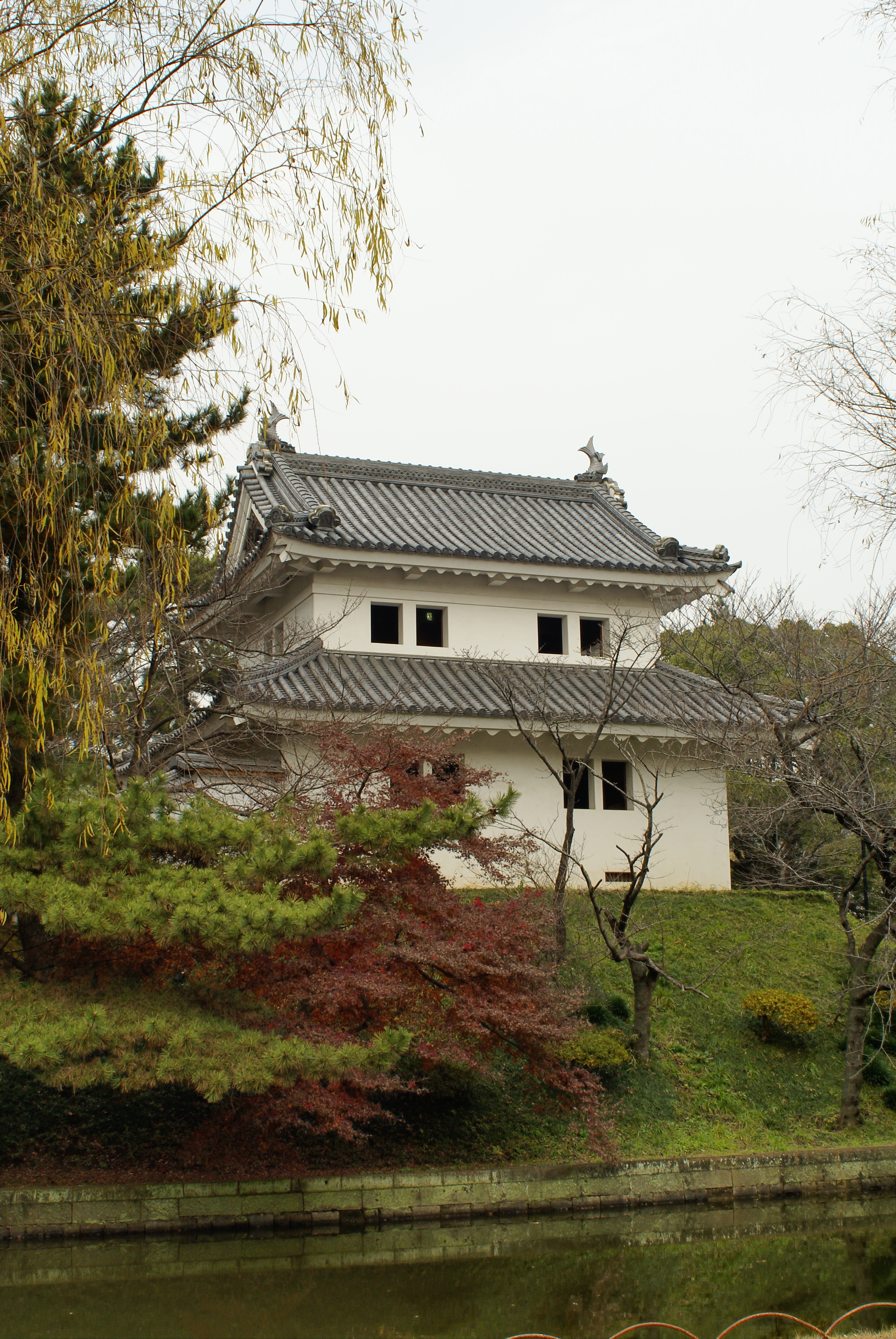 土浦城東櫓